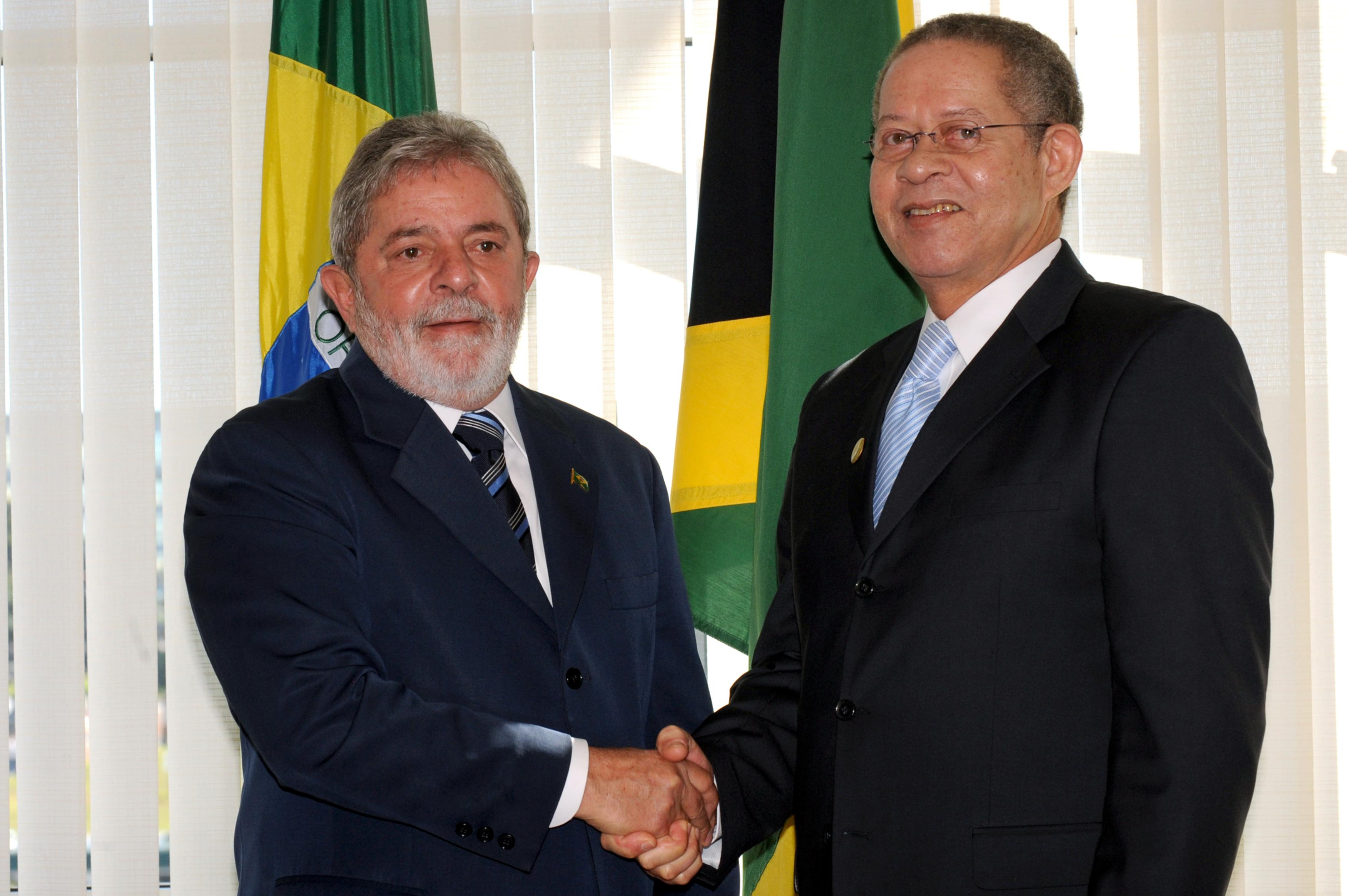 Brasília - O presidente Luiz Inácio Lula da Silva recebe os cumprimentos do primeiro-ministro da Jamaica, Bruce Golding, que participou da primeira reunião de cúpula do Brasil com chefes de Estado e de Governo da Comunidade do Caribe (Caricom) (Antônio Cruz/ABr)